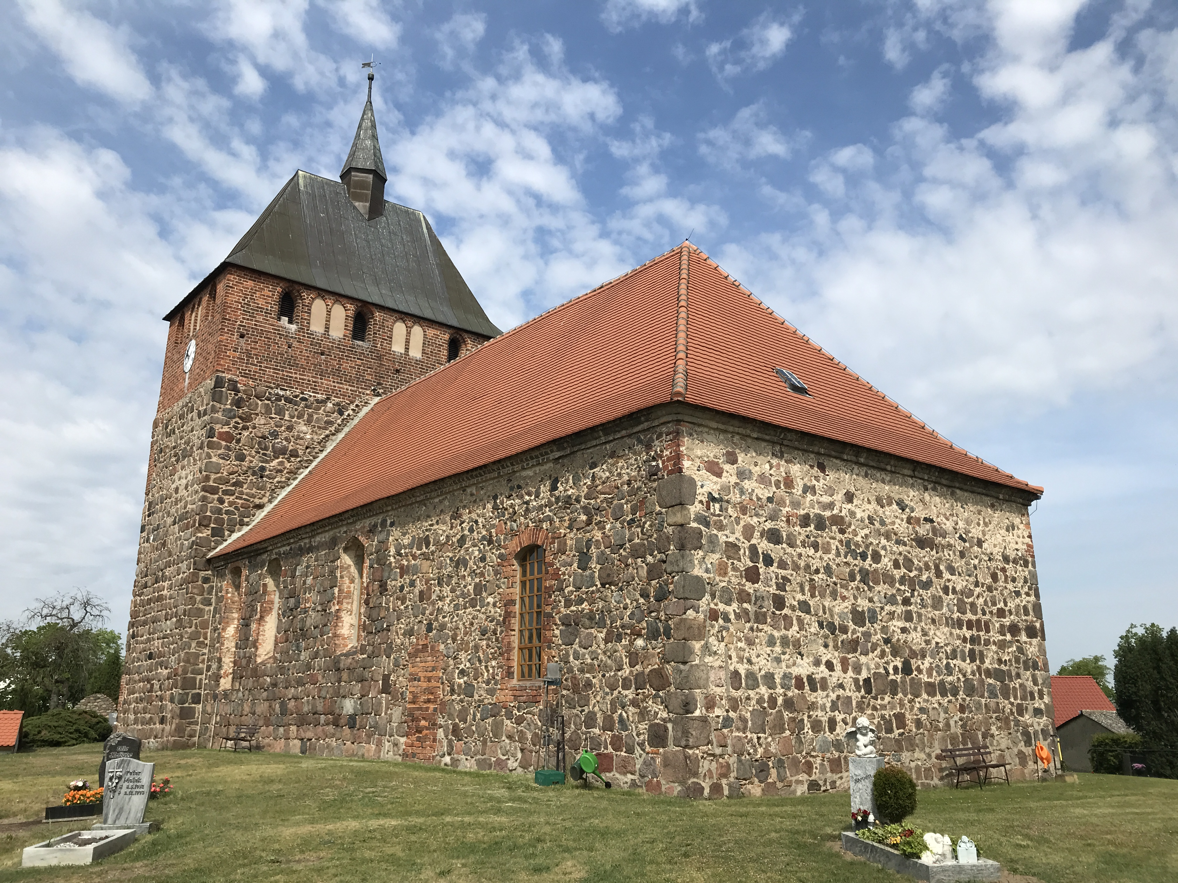 Die Dorfkirche Linthe ist eine Feldsteinkirche aus dem Anfang des 13. Jahrhunderts in Linthe, einer Gemeinde im Landkreis Potsdam-Mittelmark in Brandenburg. Im Innern steht unter anderem ein Altarretabel aus dem Anfang des 18. Jahrhunderts.